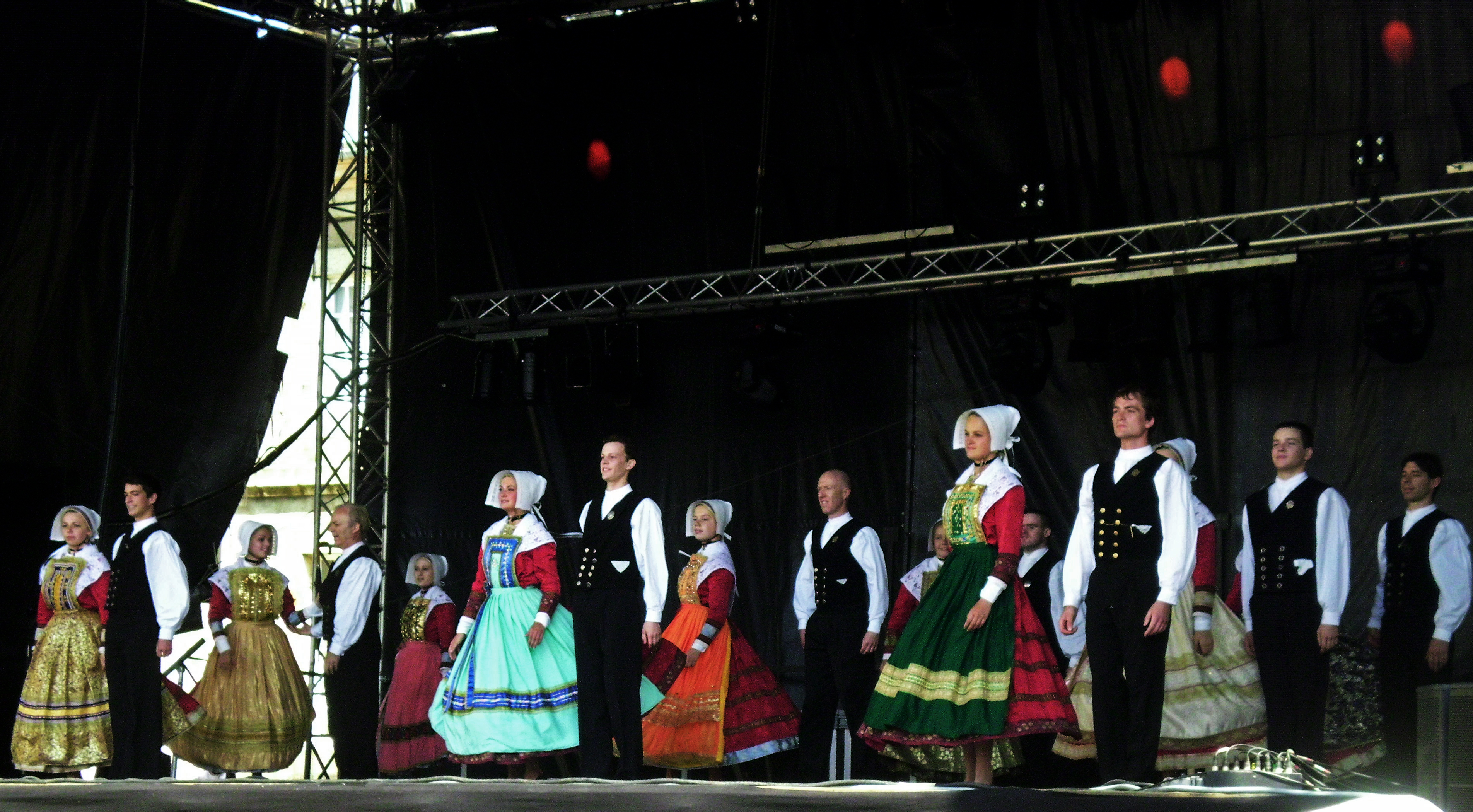 L'ensemble Bleuniadur aux fêtes folkloriques du Léon Kastell Paol (Saint-Pol-de-Léon) le 15 juillet 2012.